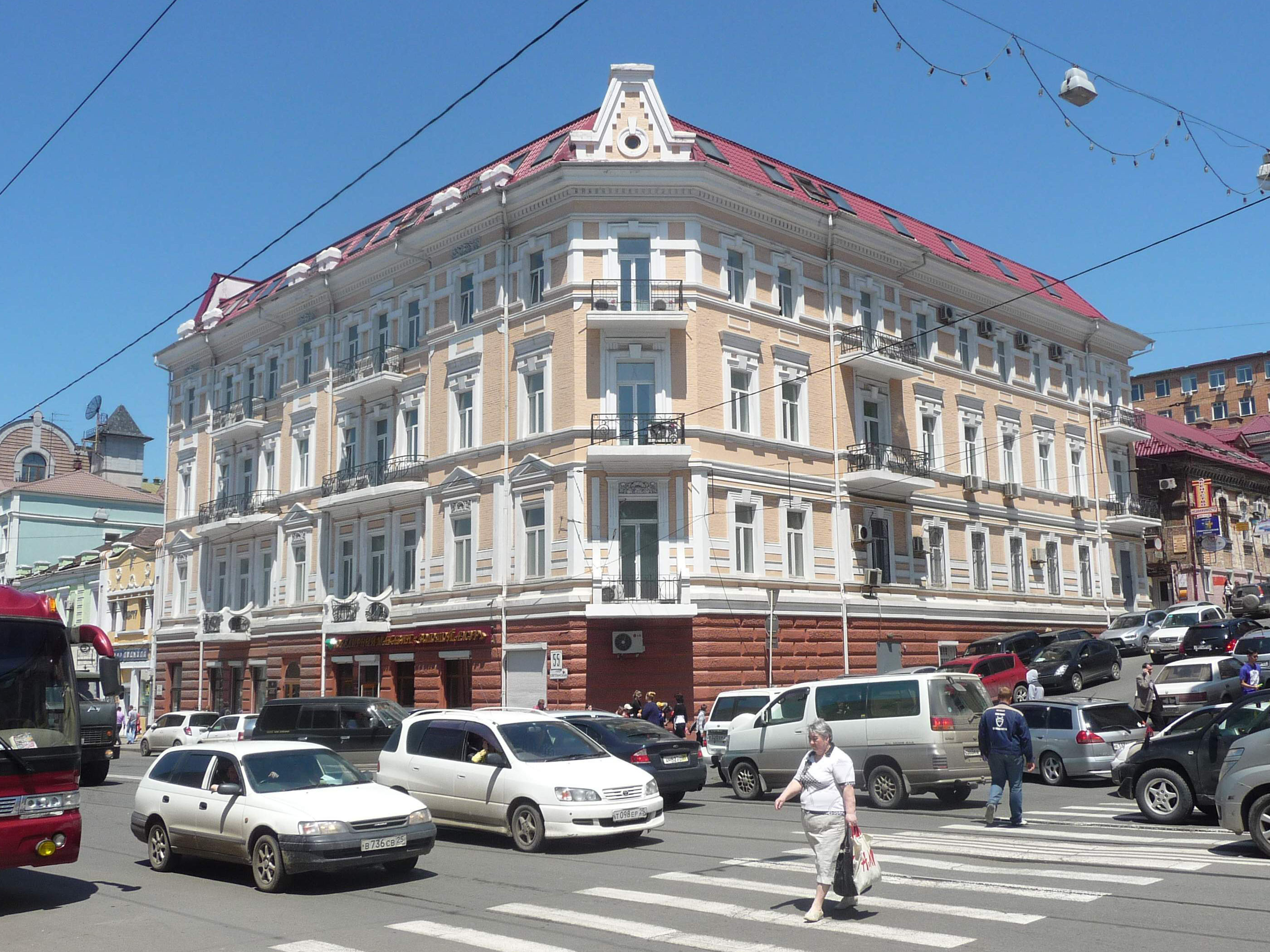 Владивосток, Светланская, 55, дом Штейнбаха, 2012-06-22